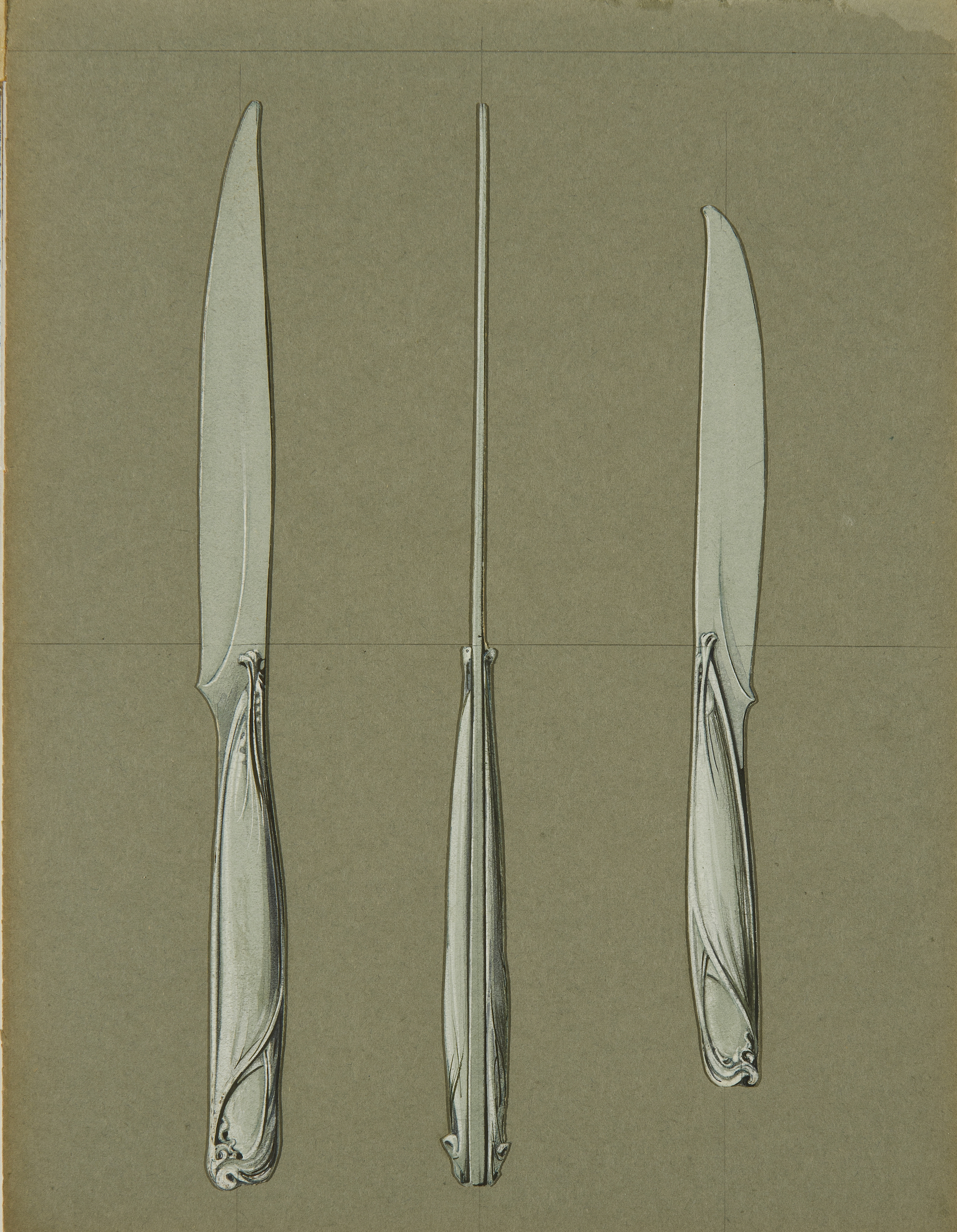 Hector Guimard (1867-1942) Modèle pour un couteau entre 1905 et 1910 Dessin au crayon rehaussé à la gouache sur papier. Bibliothèque des Arts décoratifs. Fonds Guimard Photo : Bibliothèque des Arts décoratifs / Laurent Sully Jaulmes